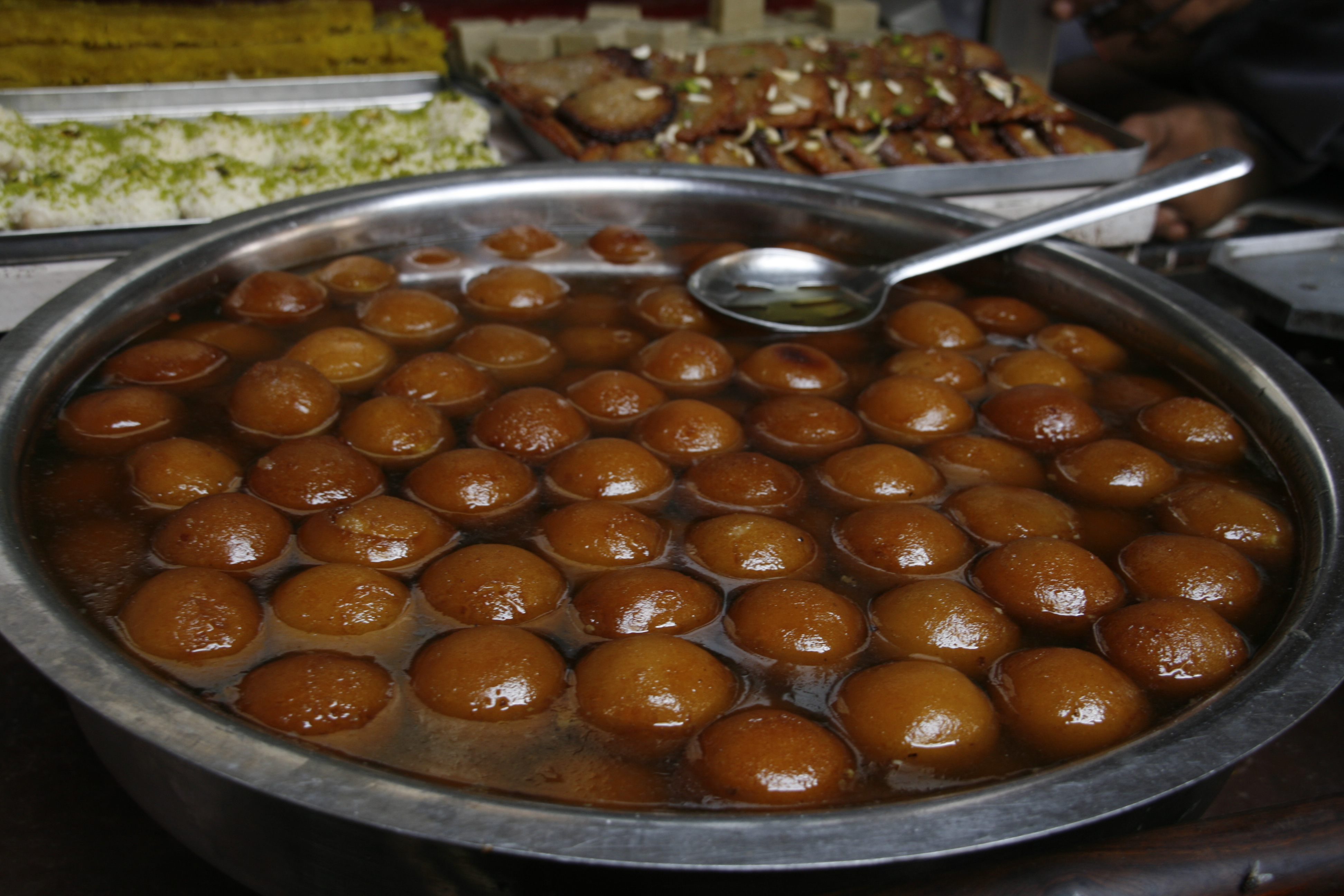 Gulab Jamun in varanasi, India